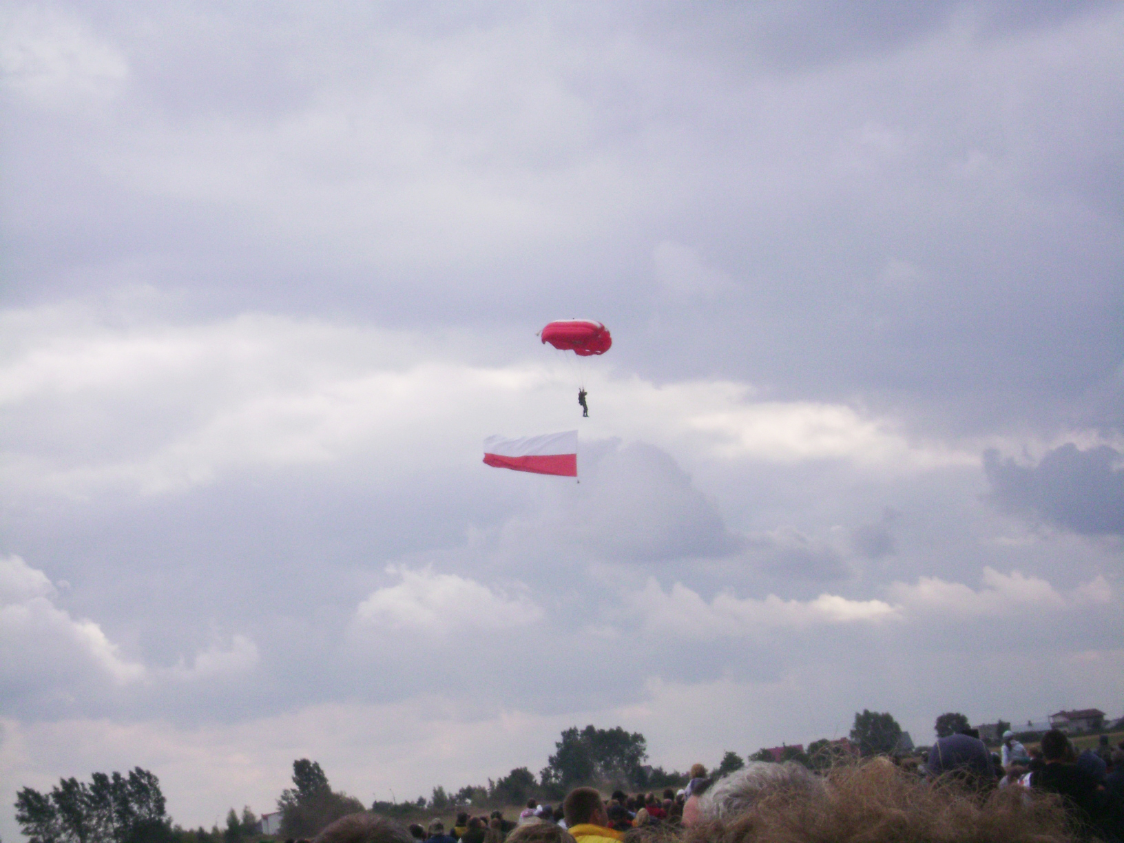 Spadochroniarz z flagą Polski na pokazach lotniczych Air Show 2007 w Radomiu